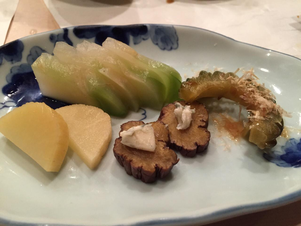 いぶりがっことクリームチーズの相性の良さは有名